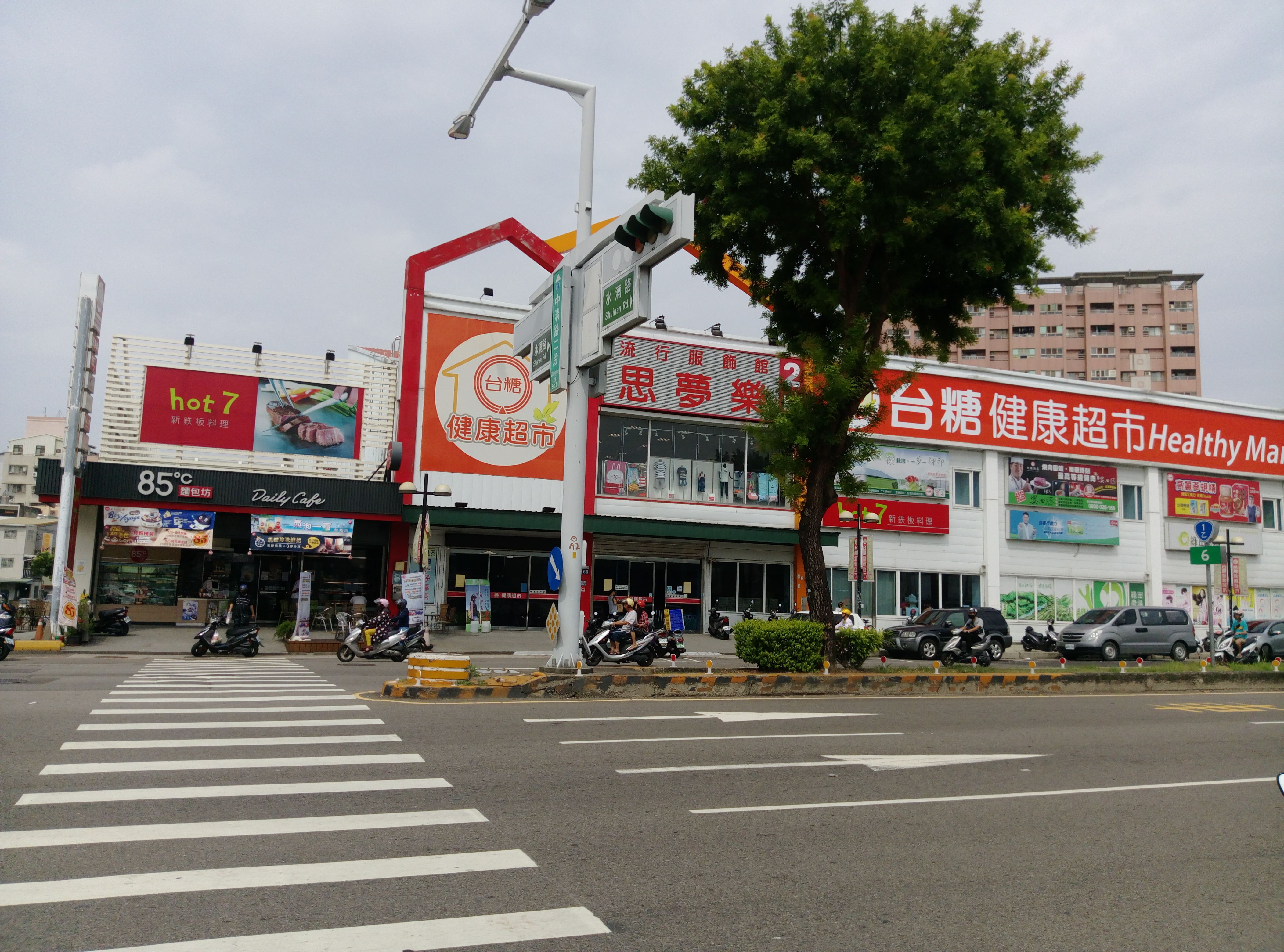 中文（台灣）: 臺中市北屯區中清路二段、水湳路口，85度C、台糖健康超市台中水湳店。